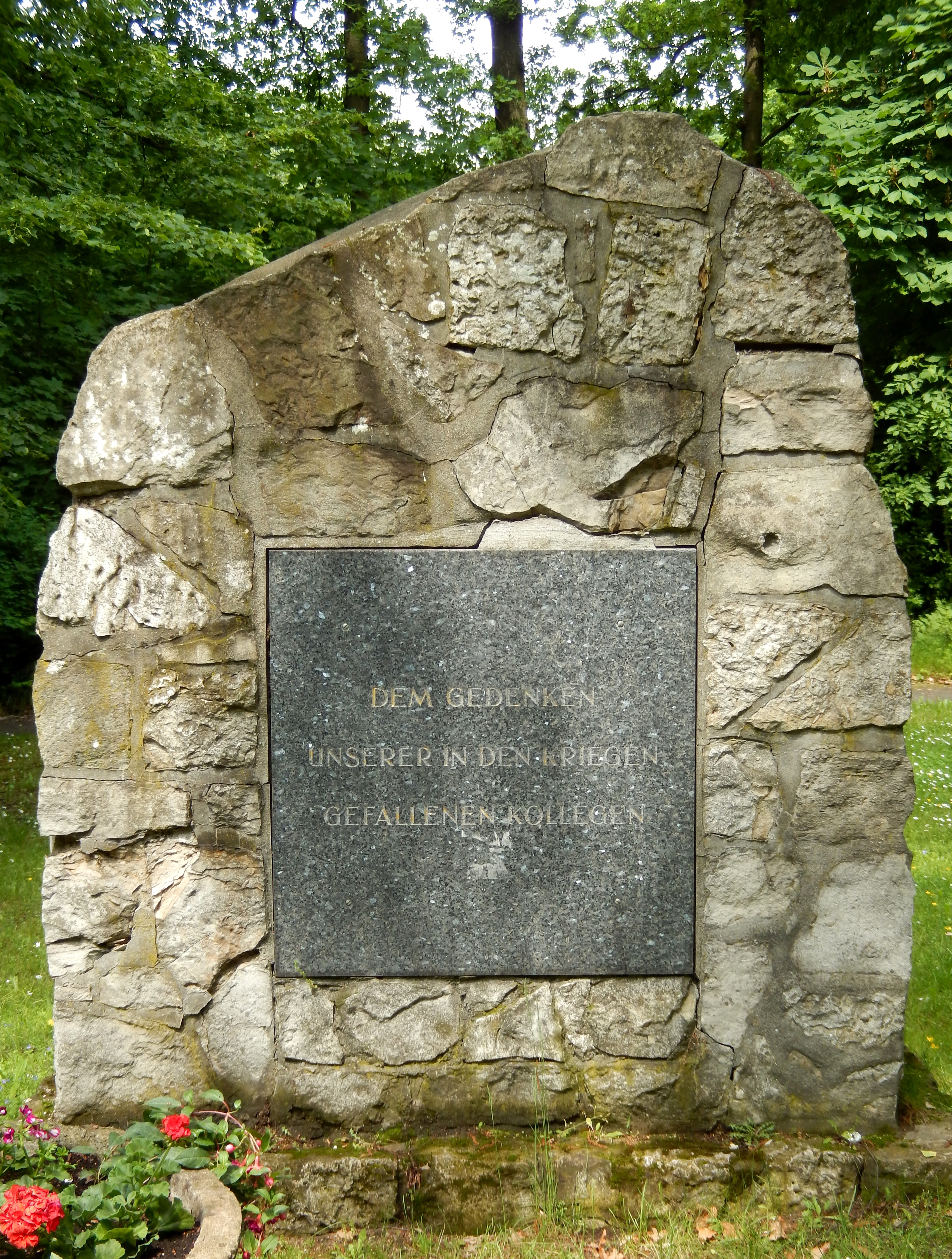 Kriegerdenkmal in der Karl-Bonhoeffer-Nervenklinik, vormals Karl-Bonhoeffer-Heilstätten, Wittenauer Heilstätten bzw. Irrenanstalt Dalldorf, von den Nationalsozialisten errichtet, am 15. Oktober 1933 eingeweiht